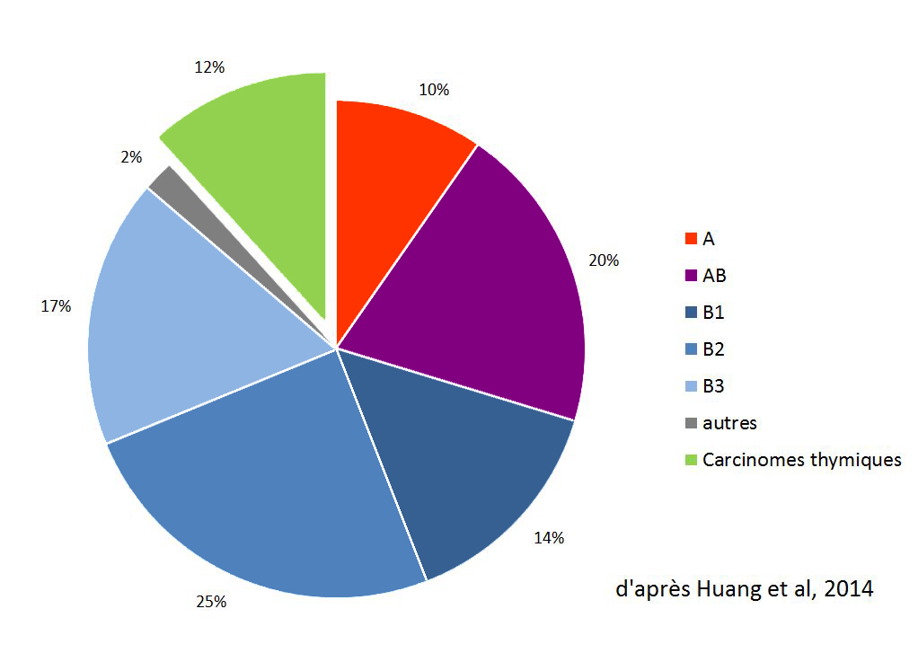 Répartition des différents types histologiques des thymomes, d'après les chiffres présentés dans Development of the international thymic malignancy interest group international database: an unprecedented resource for the study of a rare group of tumors, Huang et al, J Thorac Oncol. 2014 Oct;9(10):1573-8.